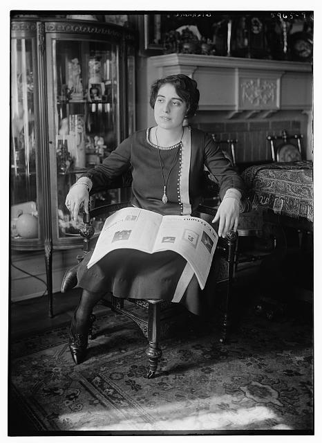 Dusolina Giannini (1902 - 1986), American-Italian soprano